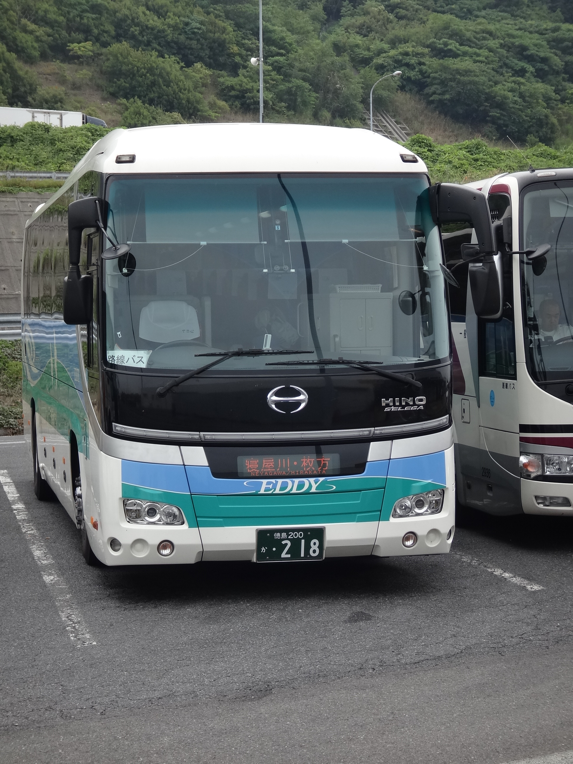 徳島バスの「あわひらかた号」室津パーキングエリアにて